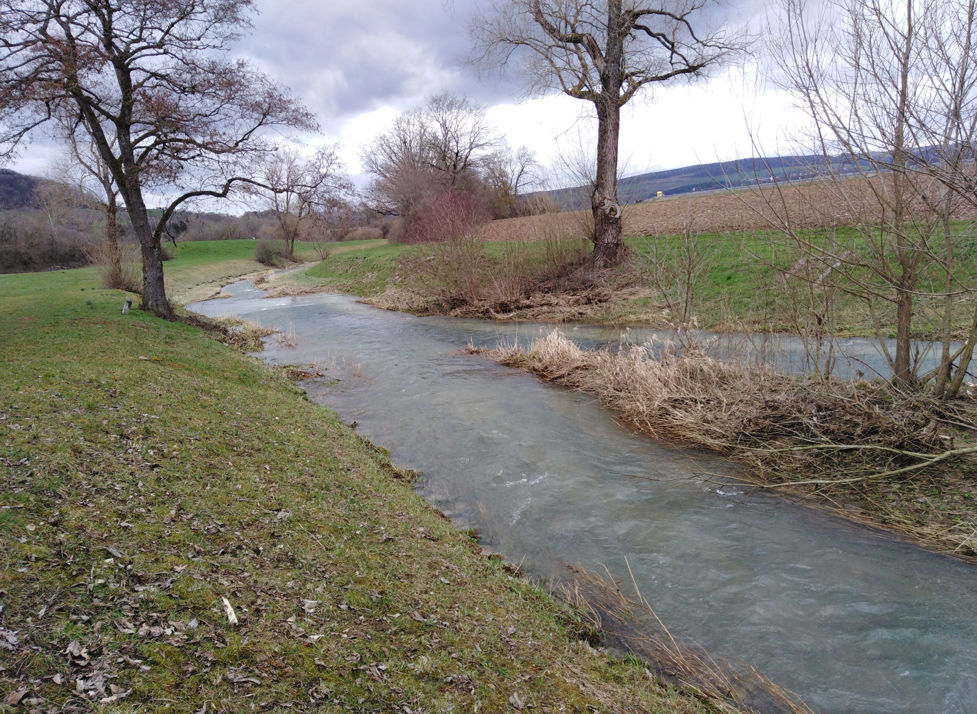 Lauchringen, Gemeinde im Landkreis Waldshut in Baden Württemberg. Die auf Oberlauchringer Gemarkung zusammenfließenden Klettgau-Bäche Klingengraben (hinten) und Schwarzbach, die als Kotbach in die Wutach münden.